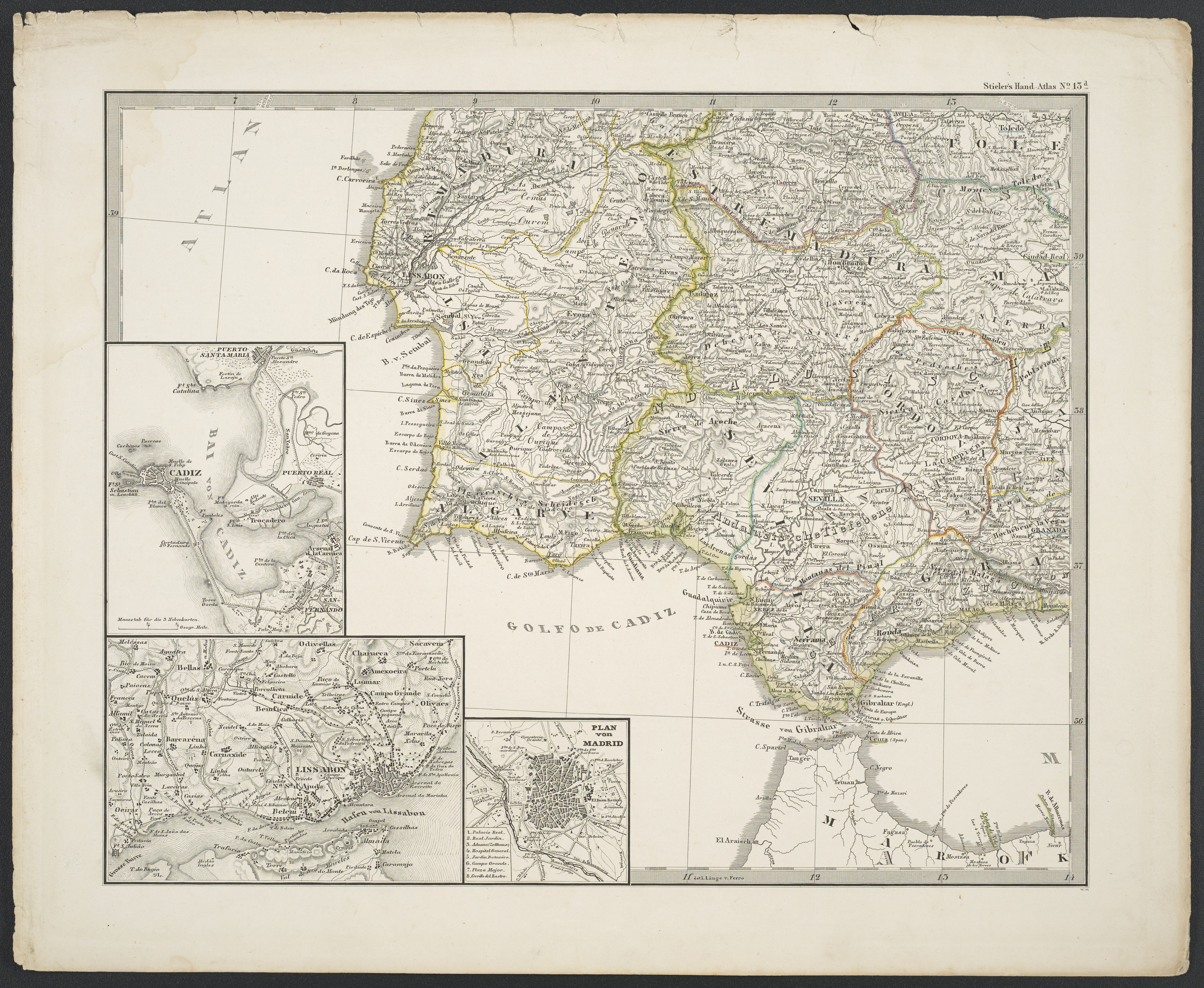 Koordinaten W 10°51'00"-W 3°29'00"/N 39°58'00"-N 34°56'00" ; Karte aus Stieler's "Hand-Atlas über alle Theile der Erde nach dem neusten Zustande und über das Weltgebäude" ; 13d